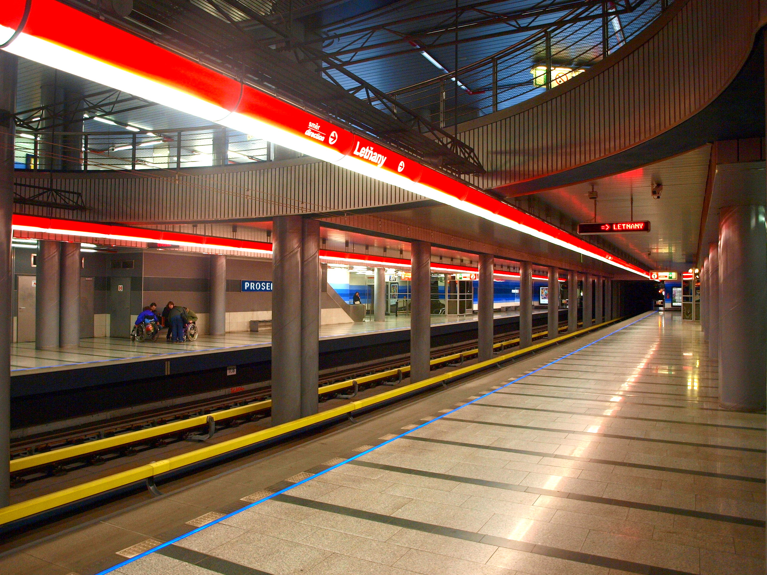 Prosek, stanice Metra C